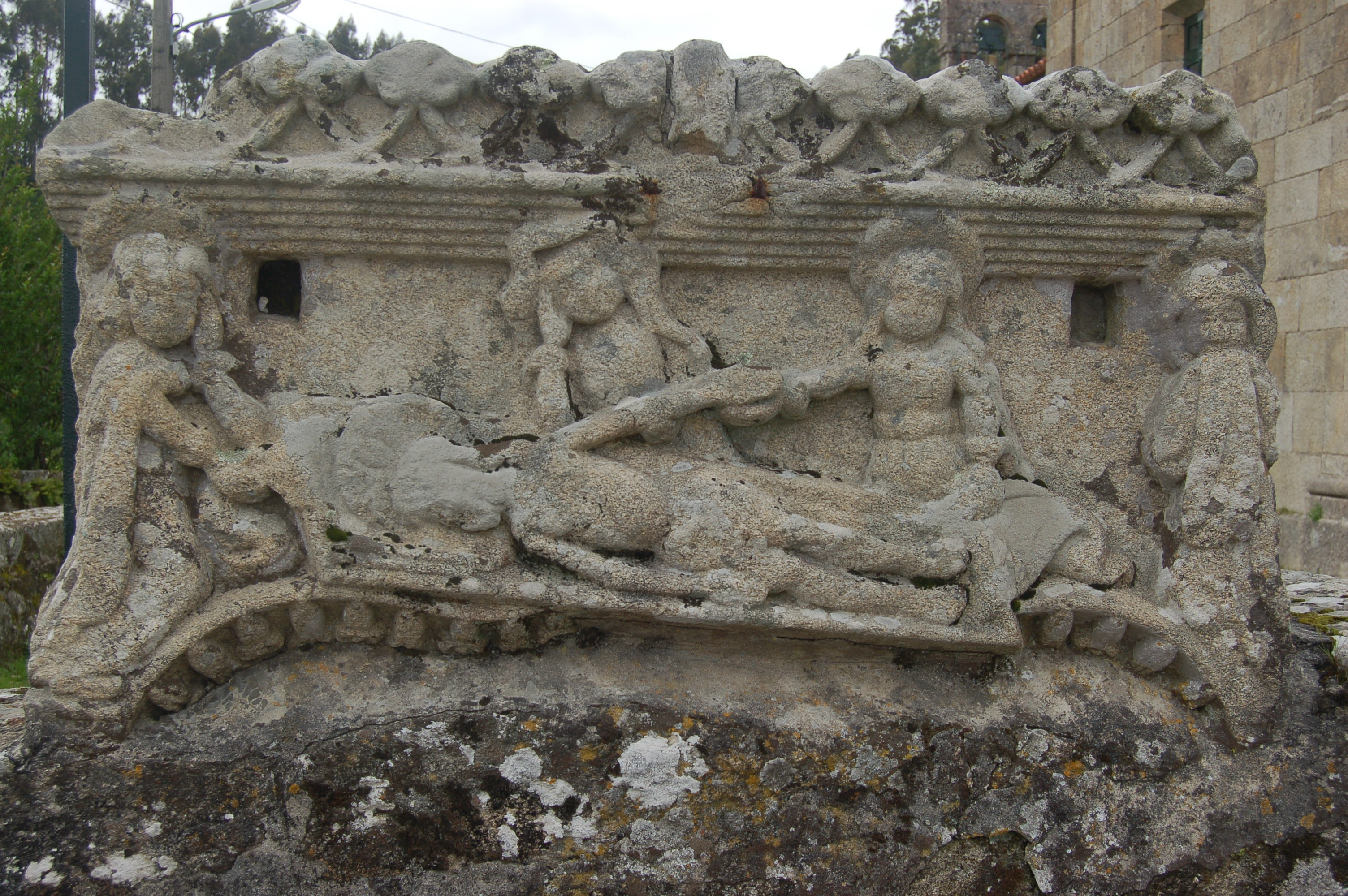 Peza do baldaquino de San Pedro de Bordóns (Sanxenxo). Representación do enterro de Cristo, coa Virxe María chorando.